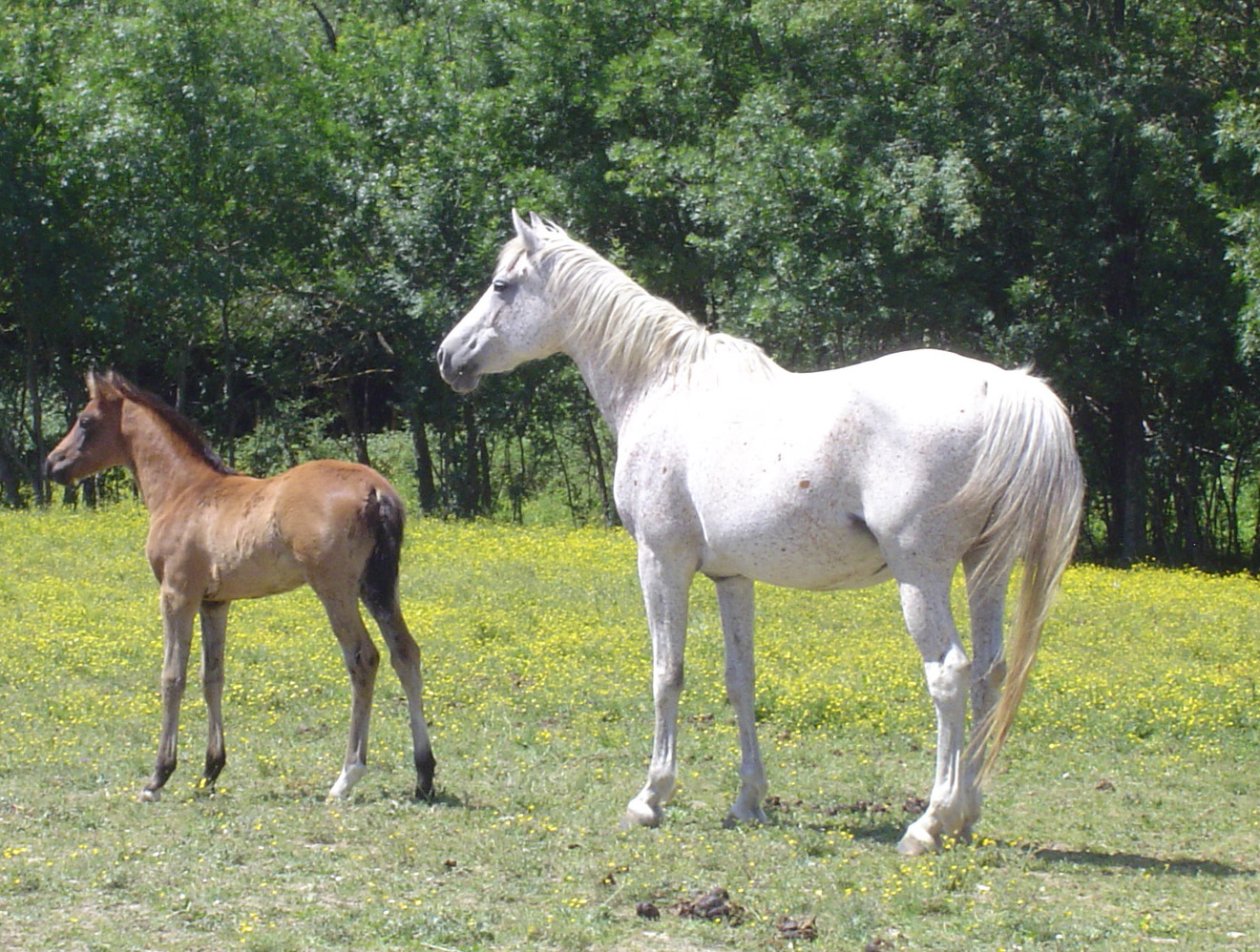 Poulinière shagya suitée